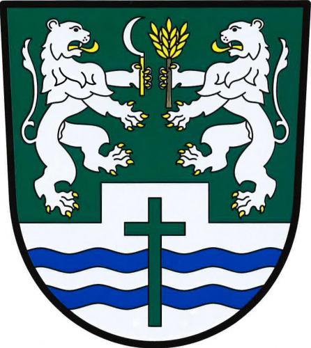 Prosíčka HB znak